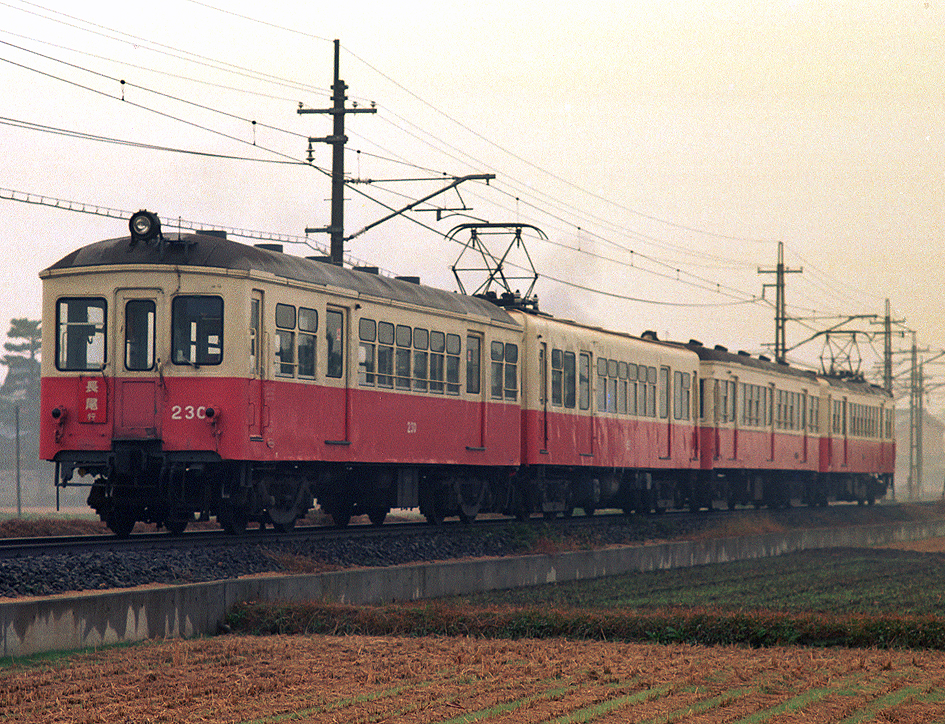 高松琴平電鉄 2000形230+60形65+850形850+750形760